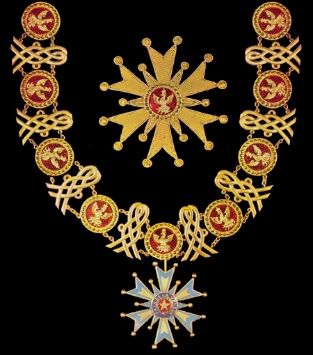 La Real y Militar Orden de San Enrique: Gran Cruz con Collar, estrella de mama, cuello y la insignia.